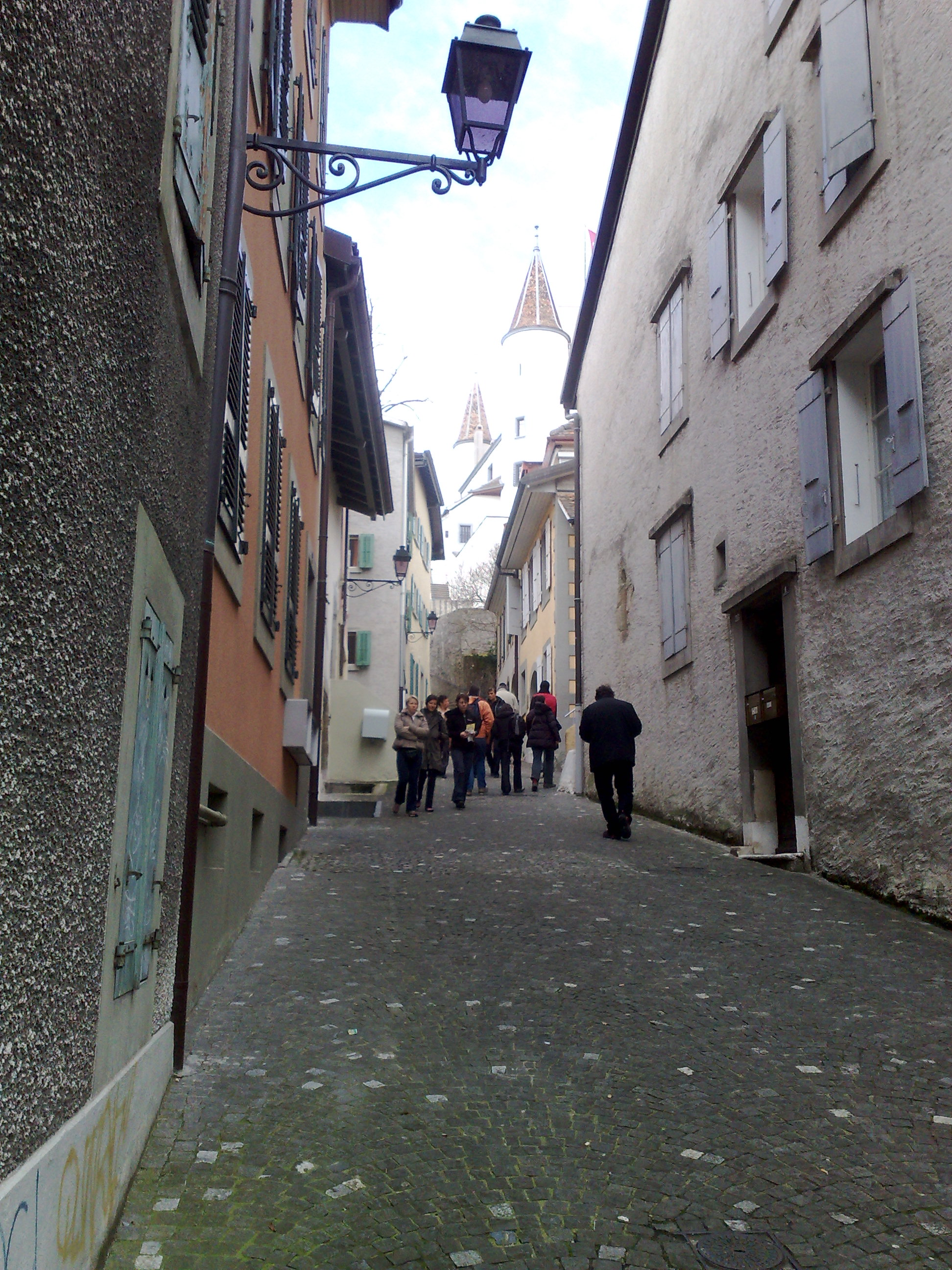 Ruelle du quartier de Rive à Nyon